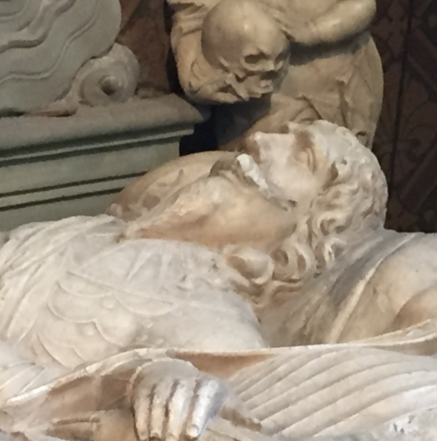 Hans Claesson Kyle - gravmonument i Uppsala Domkyrka.